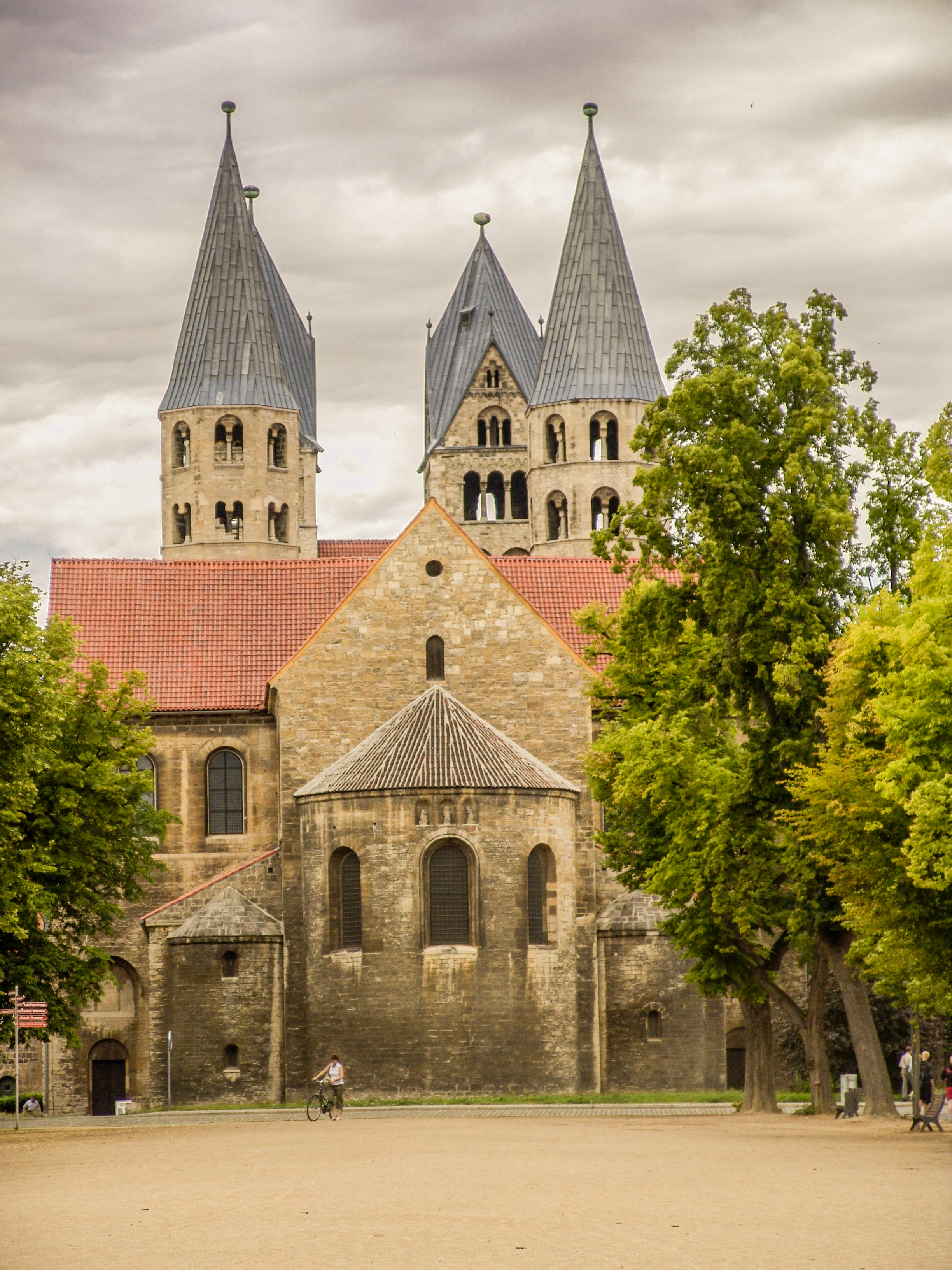 Liebfrauenkirche Halberstadt